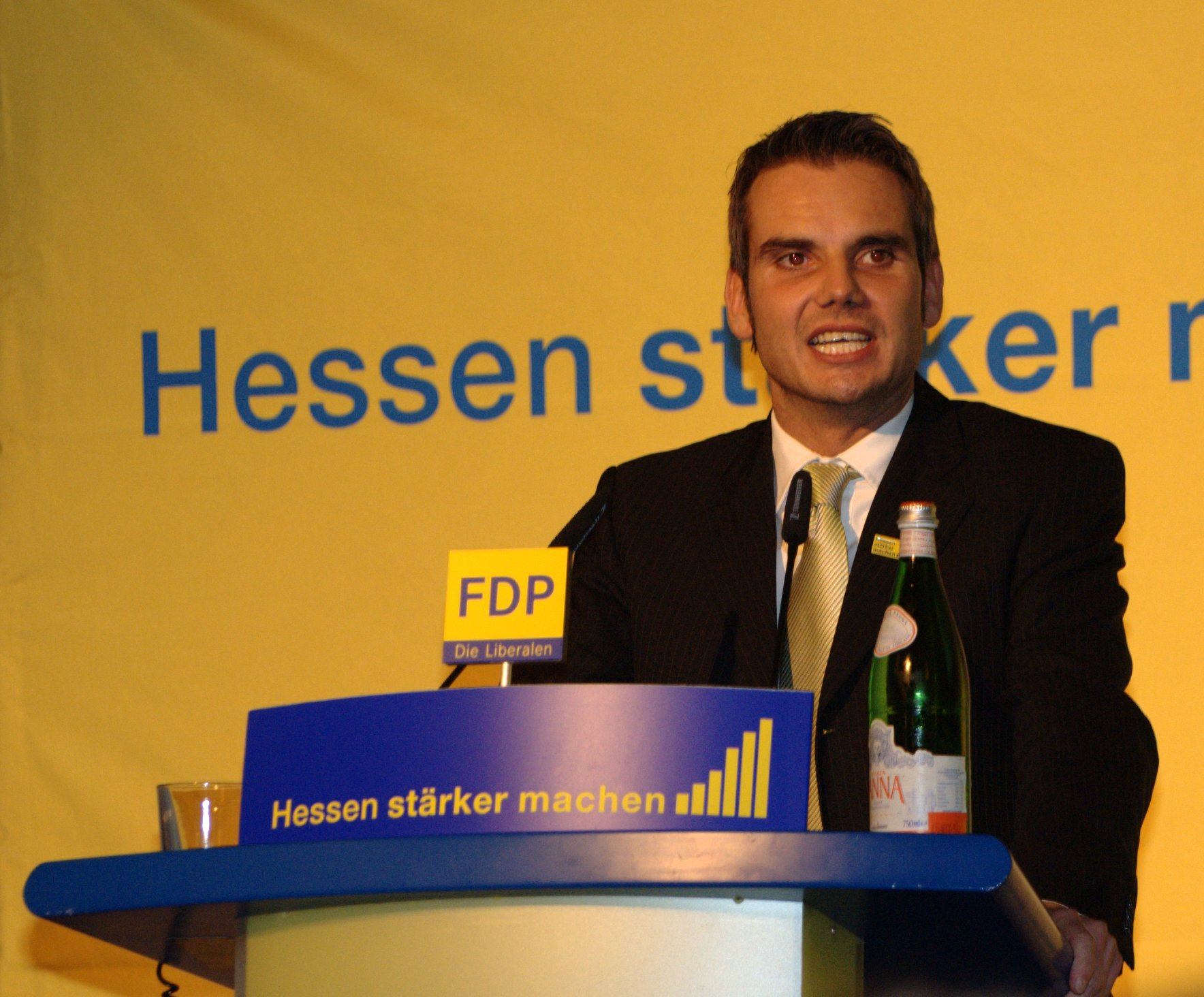 Leif Blum bei Rede zum Landtagswahlkampf Hessen 2008